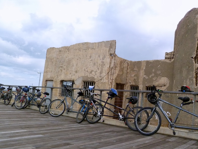 אופני טאנדם חוג רכיבה עמותת אתגרים פארק הירקון, תל אביב